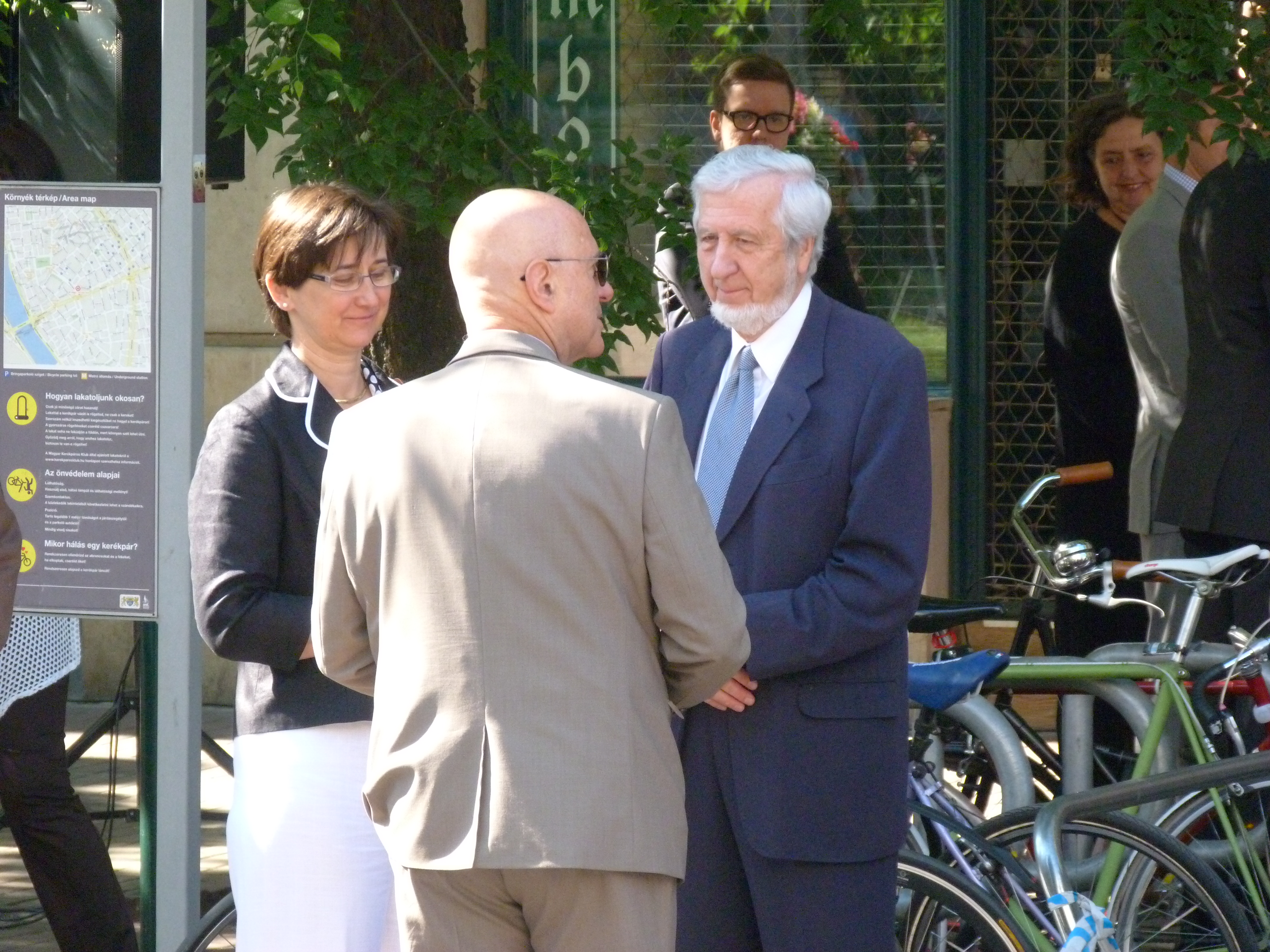 A felvétel 2013. július 4-én pénteken készült Budapesten, a Dohány utcában. Koszorús Ferenc emléktáblájának koszorúzása. Koszorúzott: Hende Csaba honvédelmi miniszter, Koszorús Ferenc. Az ünnepélyes koszorúzáson részt vett Ilan Mor, Izrael budapesti nagykövete, André Goodfriend, az Amerikai Egyesült Államok ideiglenes ügyvivője, az Országgyűlés honvédelmi és rendészeti bizottságának alelnökei, Simon Miklós (Fidesz-KDNP) és Harangozó Tamás Attila (MSZP), Kun Szabó István vezérőrnagy, a Honvédelmi Minisztérium társadalmi kapcsolatokért felelős helyettes államtitkára, valamint Réthelyi Miklós, volt nemzetierőforrás-miniszter.